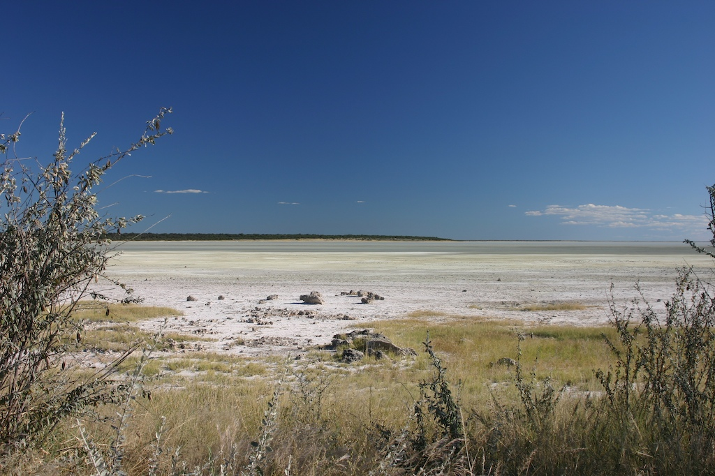 Etosha pan